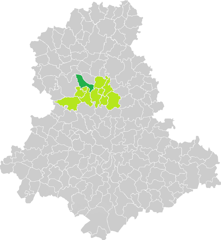 Carte de situation de la commune de Berneuil (en vert foncé) dans le votre Canton (en vert clair) sur une carte des communes de la Haute-Vienne